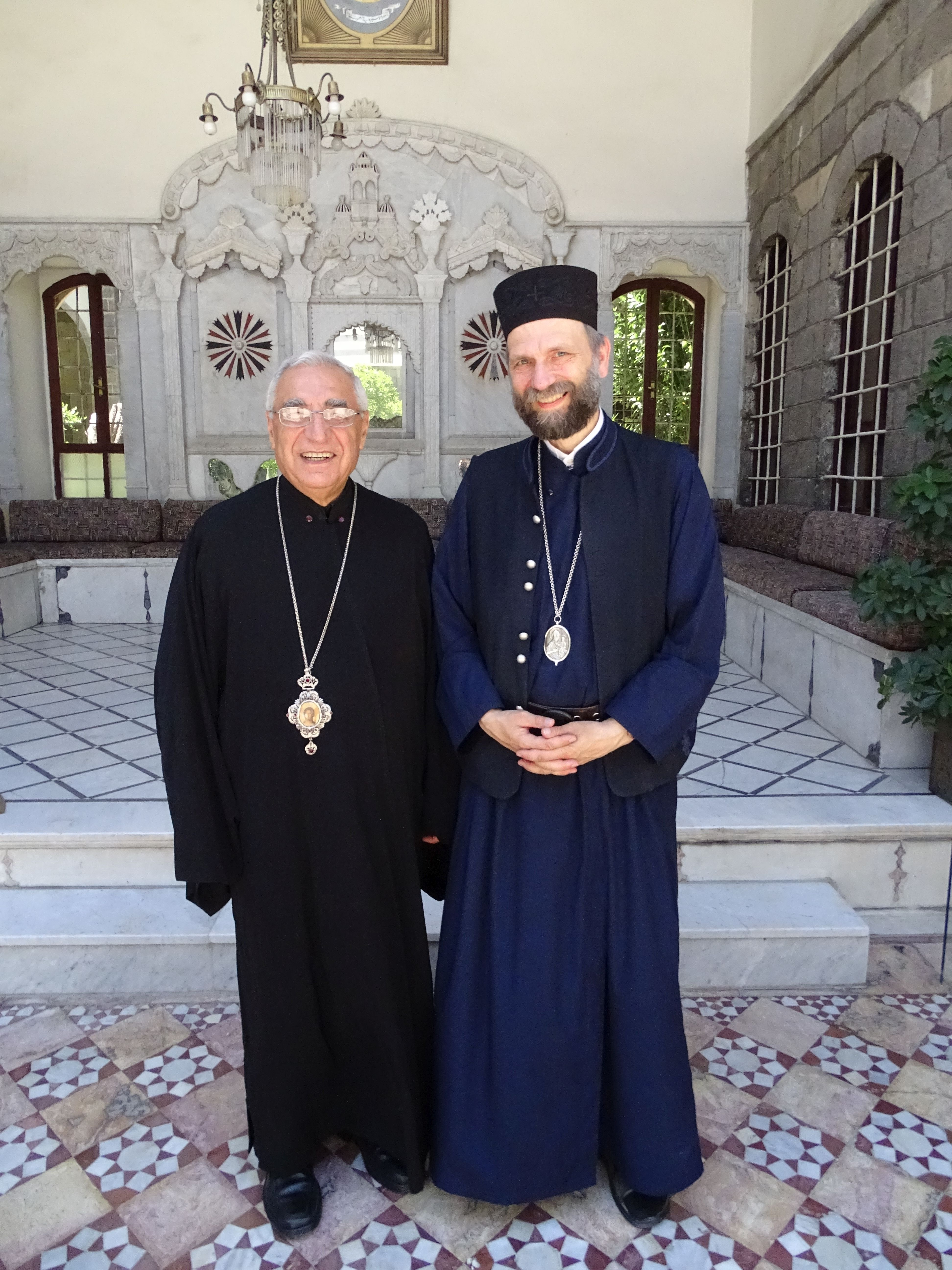 Kocsis Fülüp Jusszef Abszi damaszkuszi melkita püspökkel